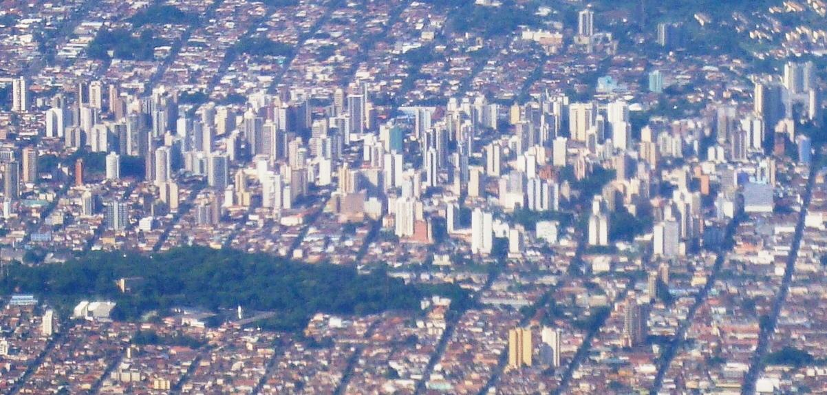 Região Central de Ribeirão Preto